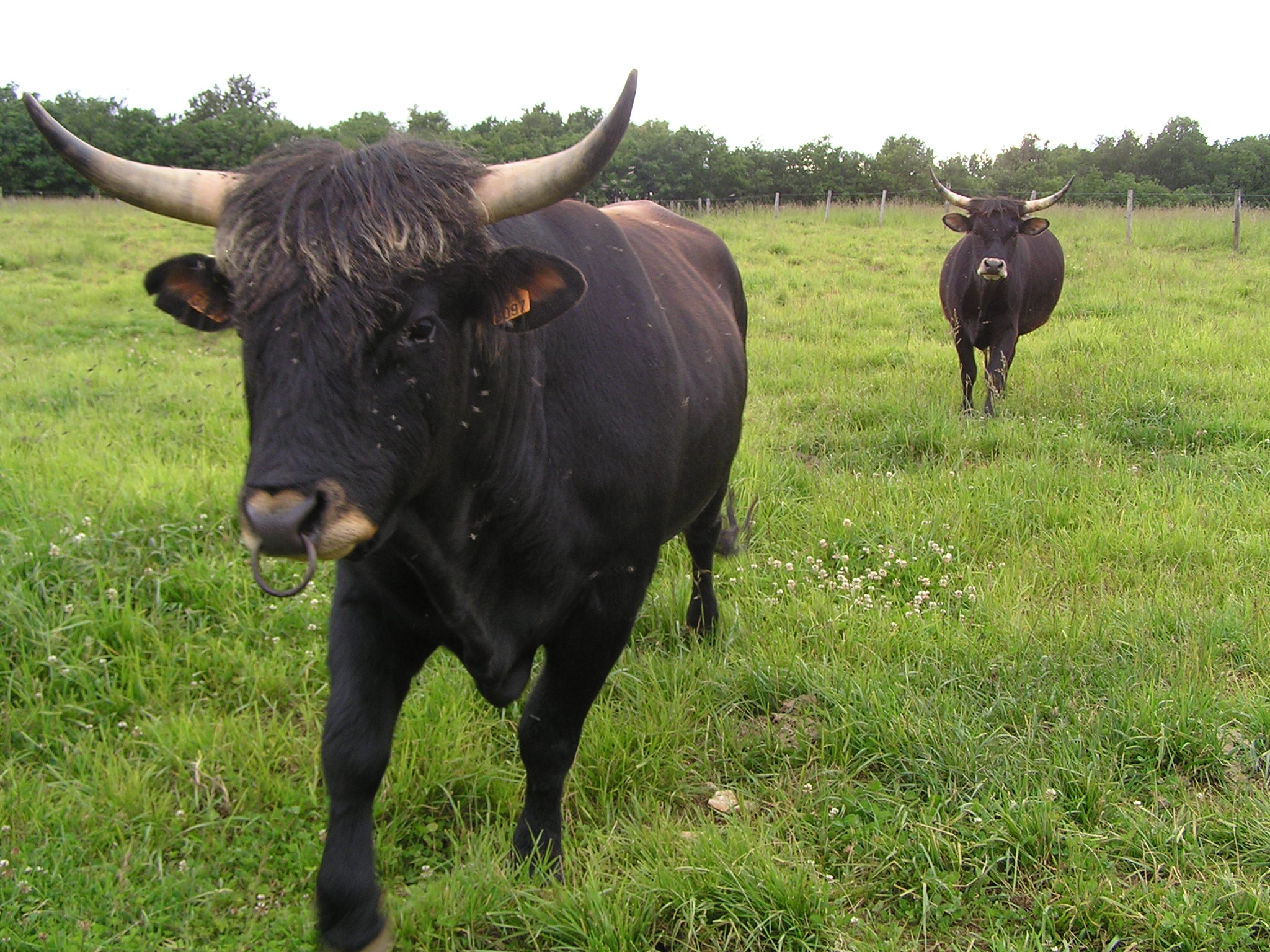 auroch élevage en Charente